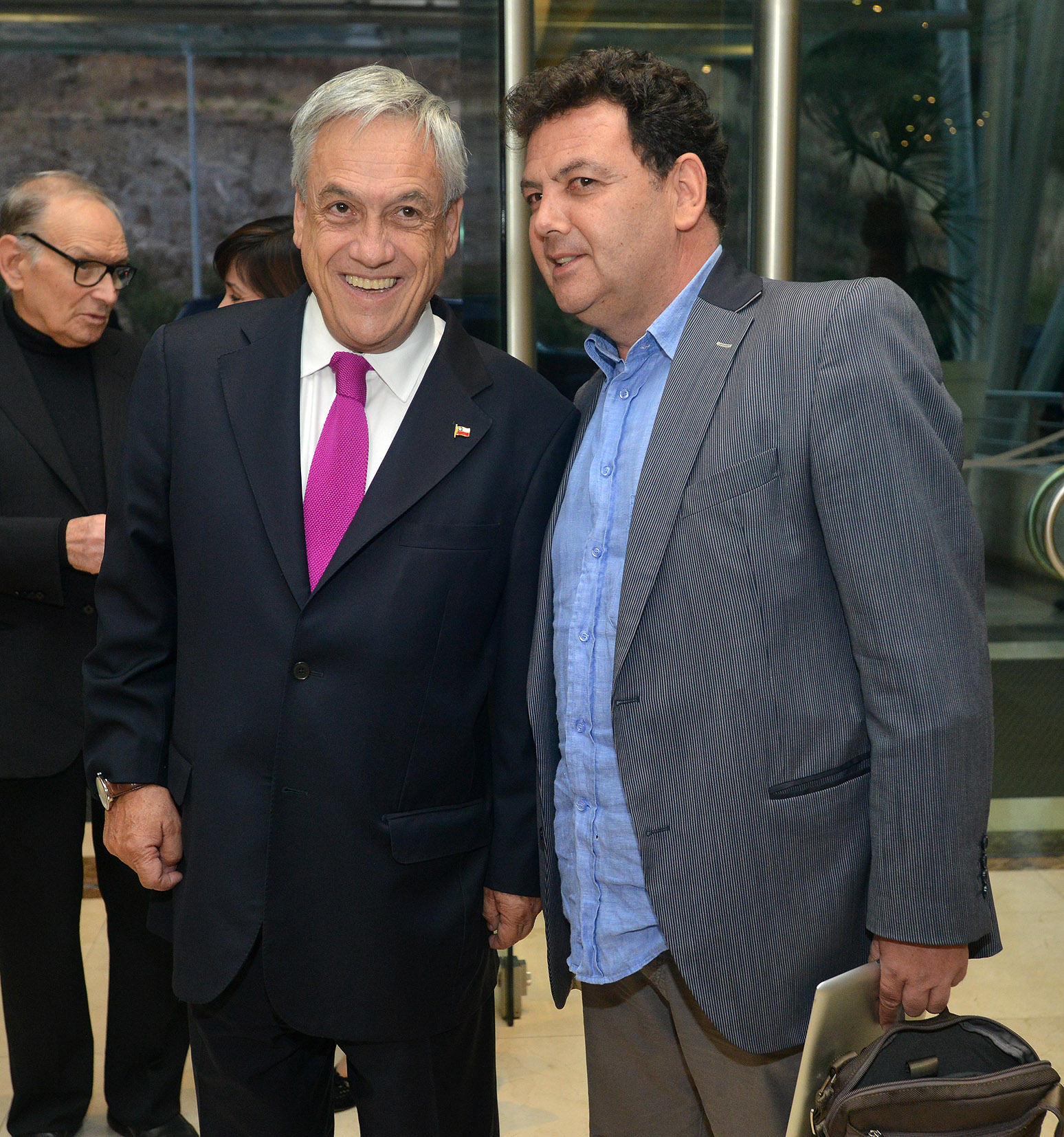 26-11-2013 Concierto de Ennio Morricone